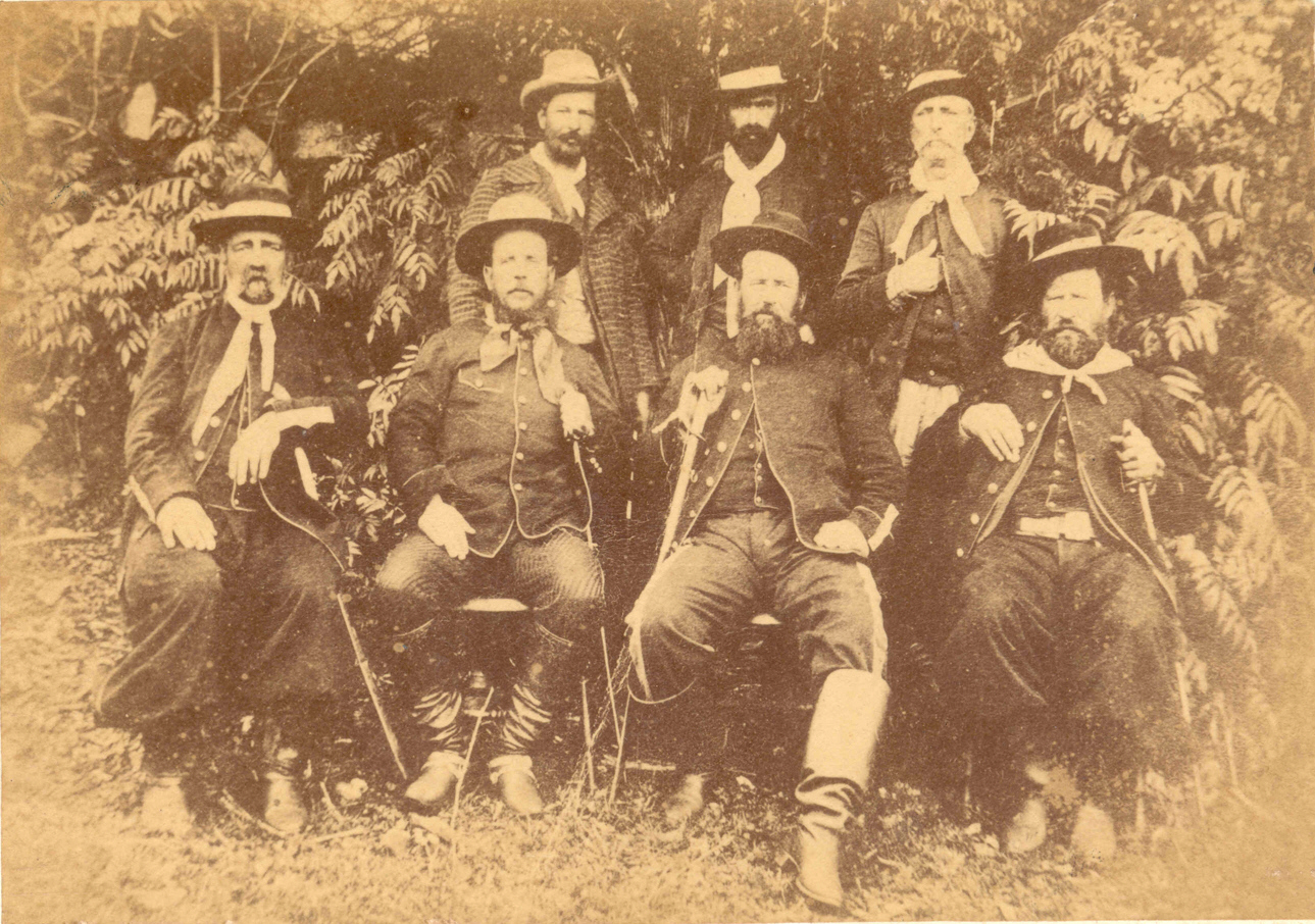 Fotografía de Gumercindo Saraiva, Aparicio Saravia (ambos al centro) y sus comandantes en la Revolución Federalista Riograndense en Brasil en 1893.